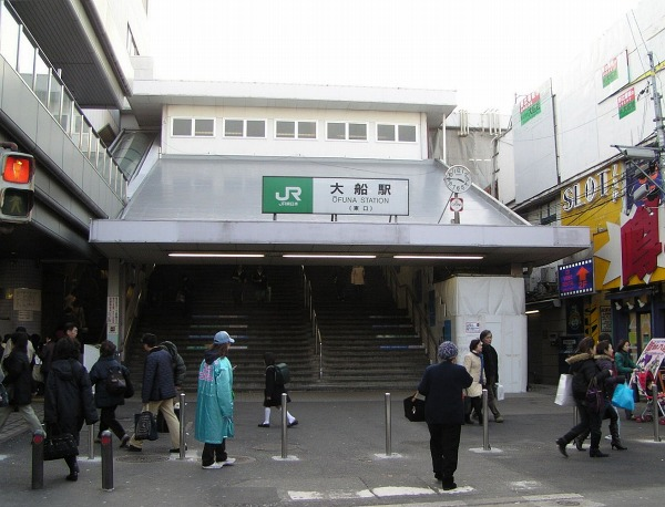 大船駅 Ōfuna Station